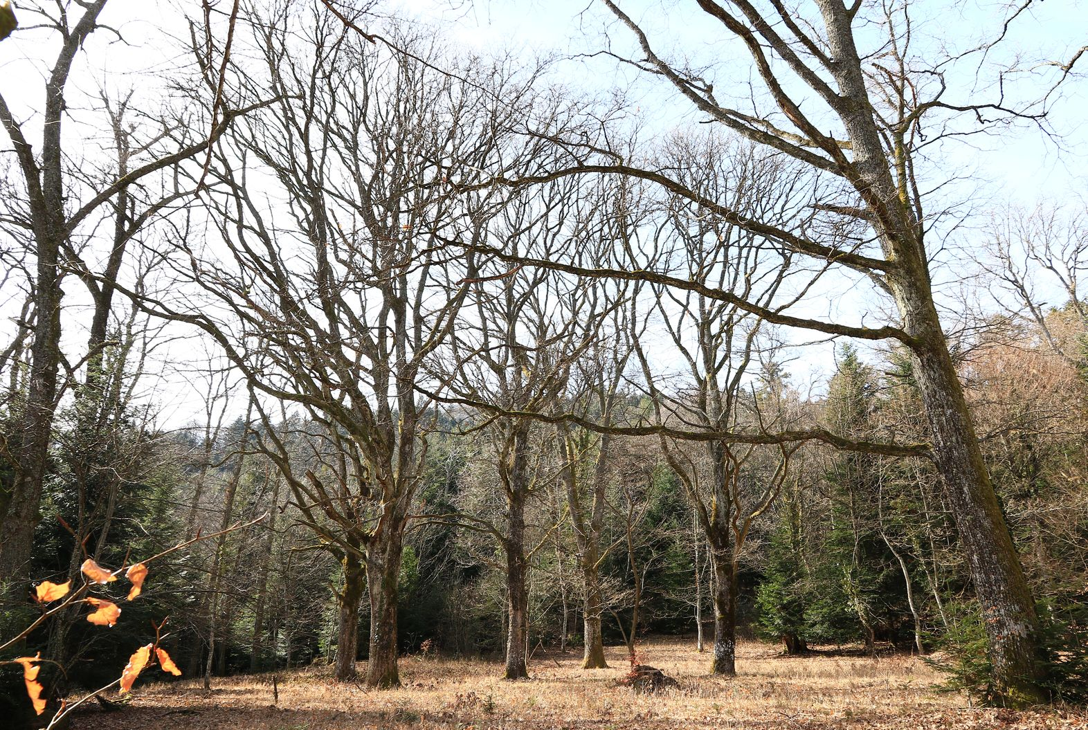 Jusque dans les années 1970, les instituteurs des écoles de Guebwiller, emmenaient les enfants au "Saulager", pour y découvrir la Nature et faire du sport, toutes les semaines de l'année.